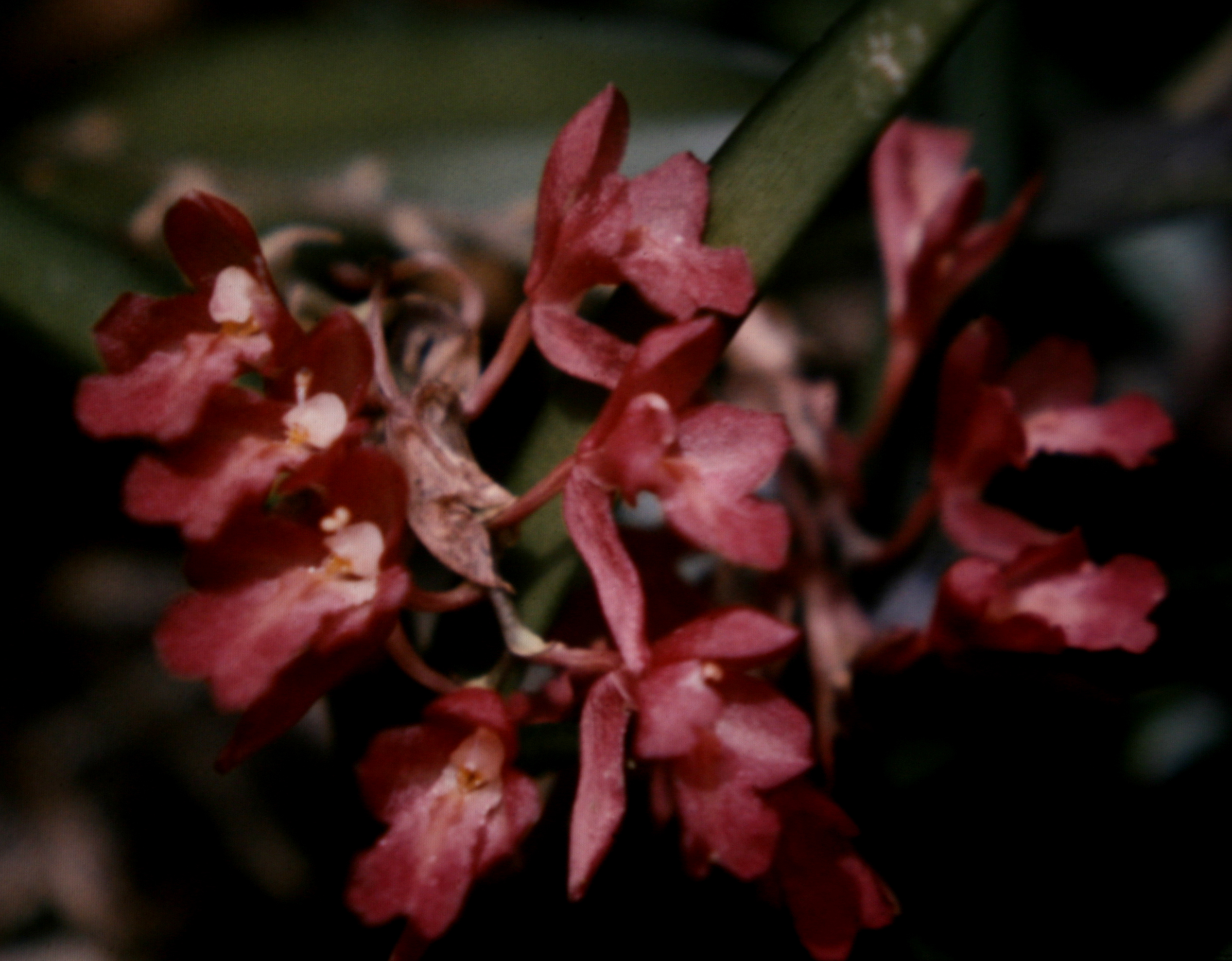 Rodriguezia lanceolata, Suriname. Syn: Rodriguezia secunda